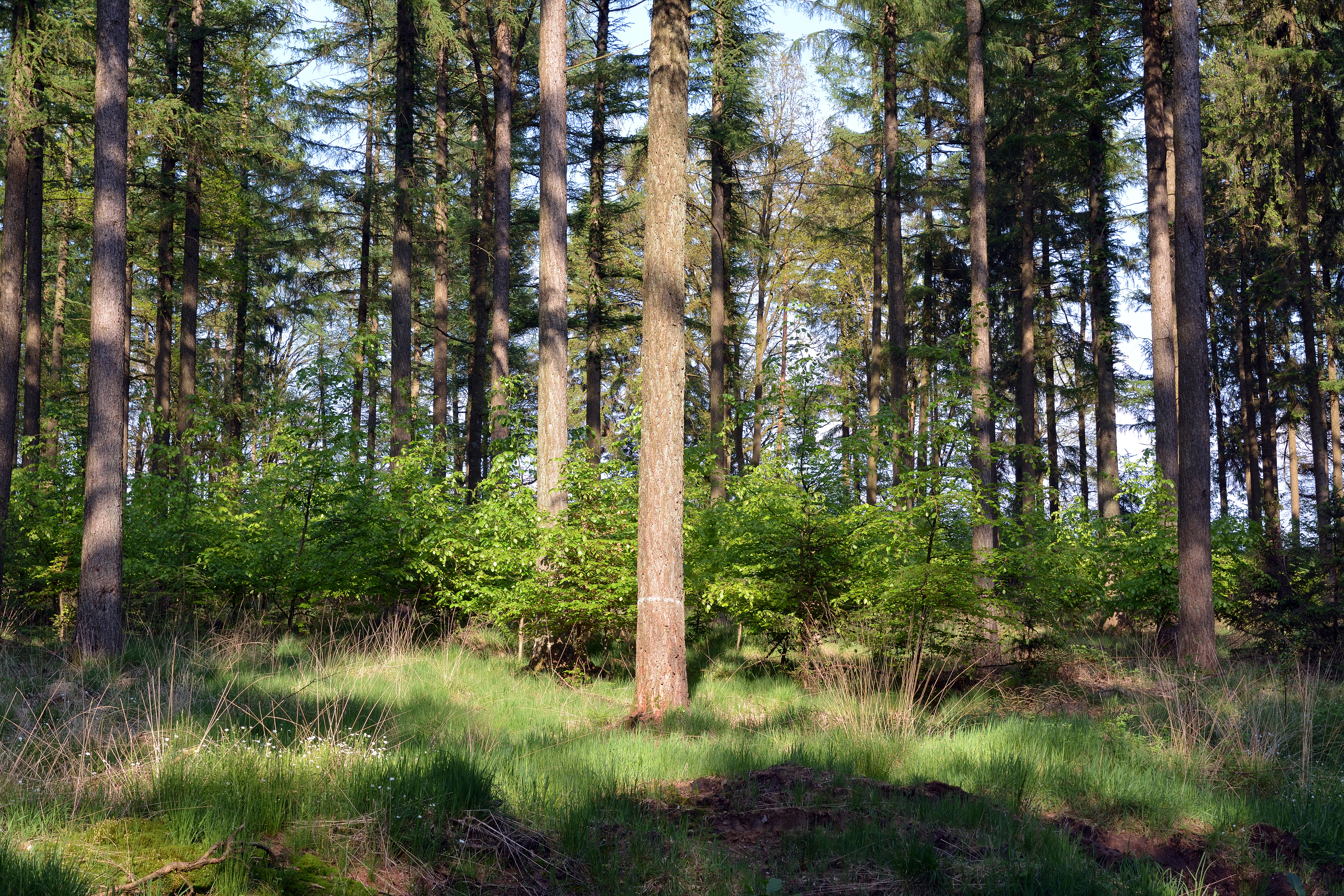 Impressionen aus dem FFH-Gebiet "Moore bei Christinenthal" in Looft.